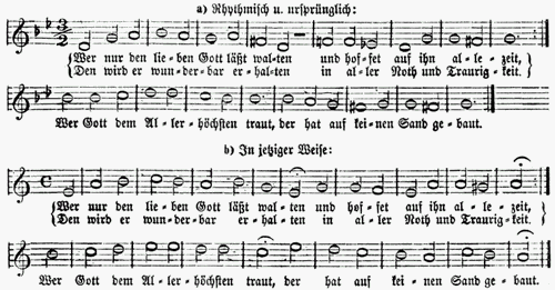 Text and Melody of the church song Wer nur den Lieben Gott lässt walten